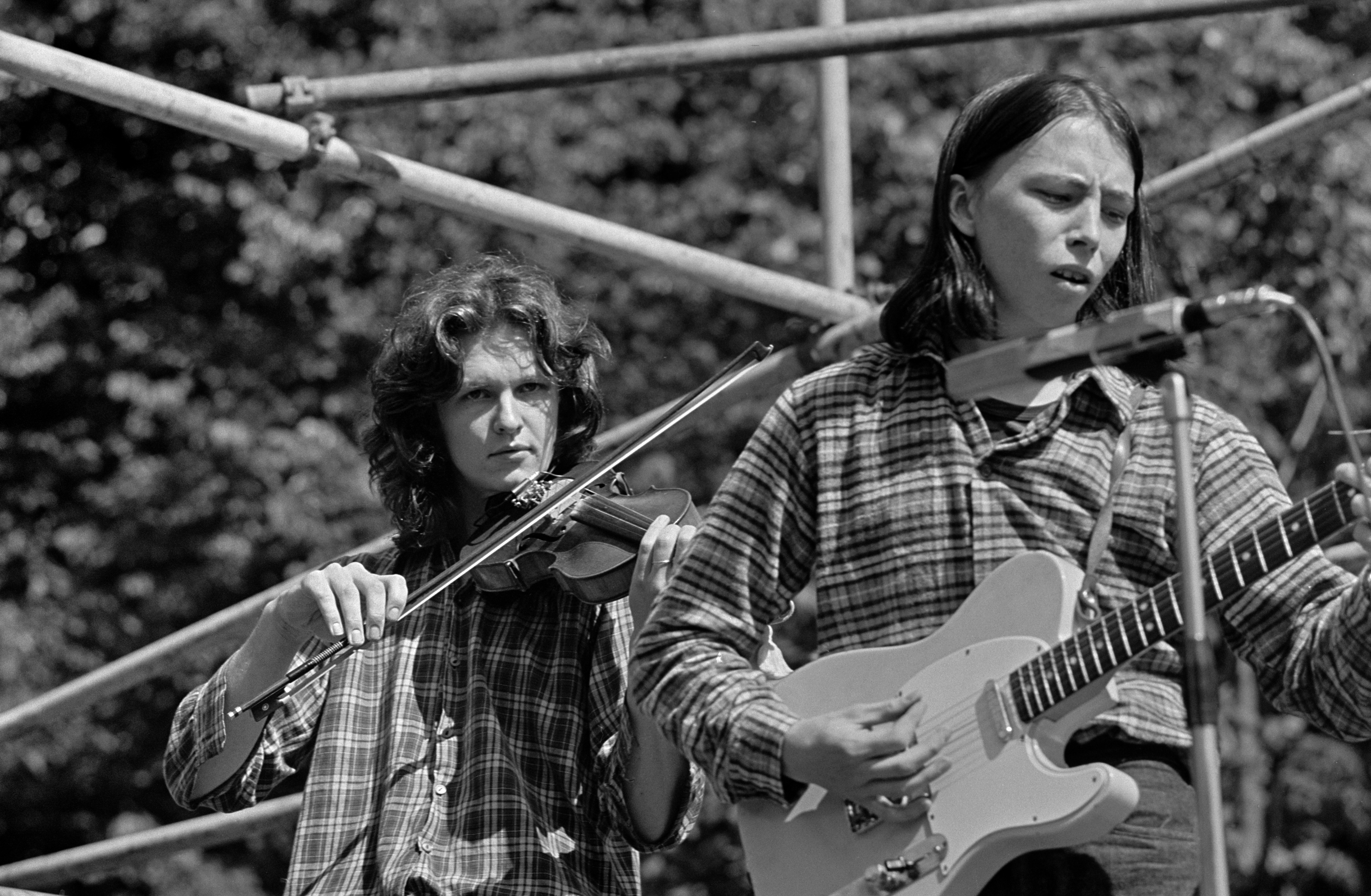 Vanha Isäntä -yhtye esiintyy Helsingin juhlaviikkojen ulkoilmakonsertissa Kaivopuistossa. Vasemmalla Seppo Sillanpää (viulu), oikealla Olli Haavisto (kitara).